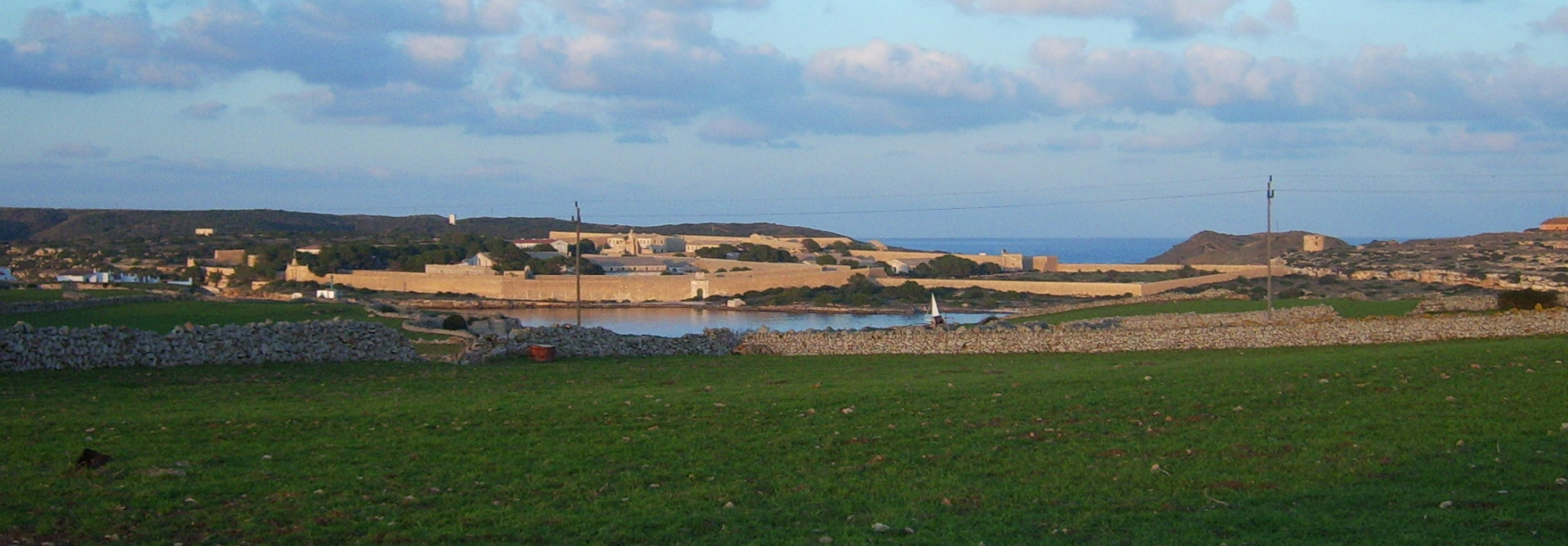 Lazareto island, Menorca.